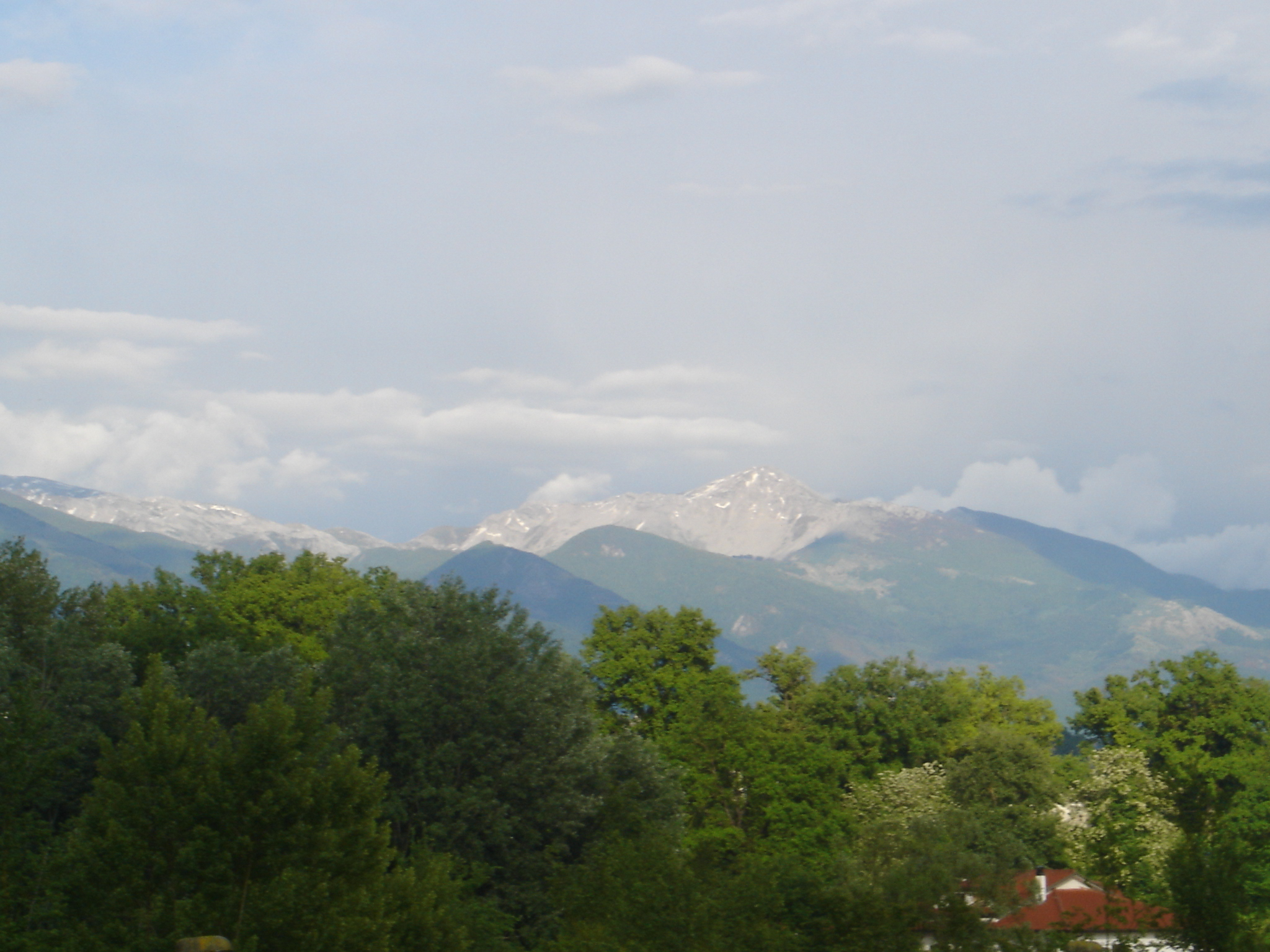 Monte Meta.